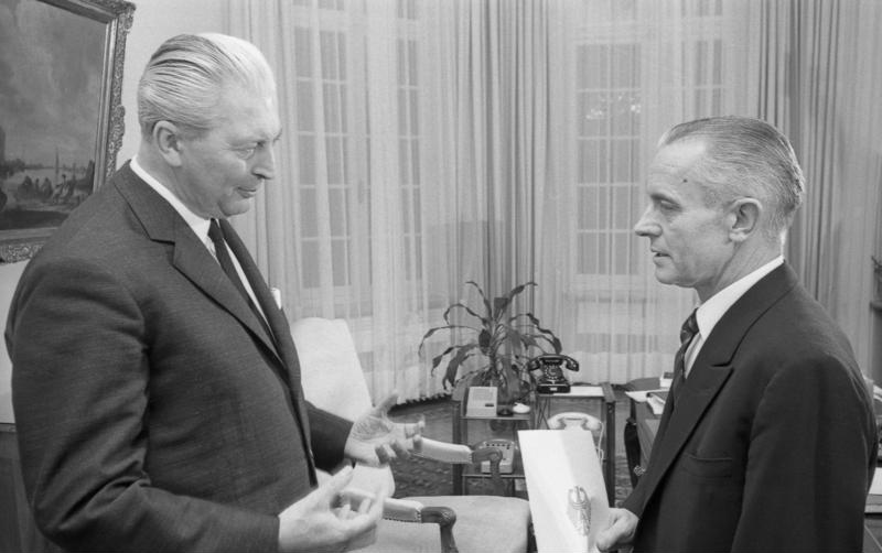 Bundeskanzler Kiesinger überreicht Staatssekretär Dr. Knieper die Ernennungsurkunde